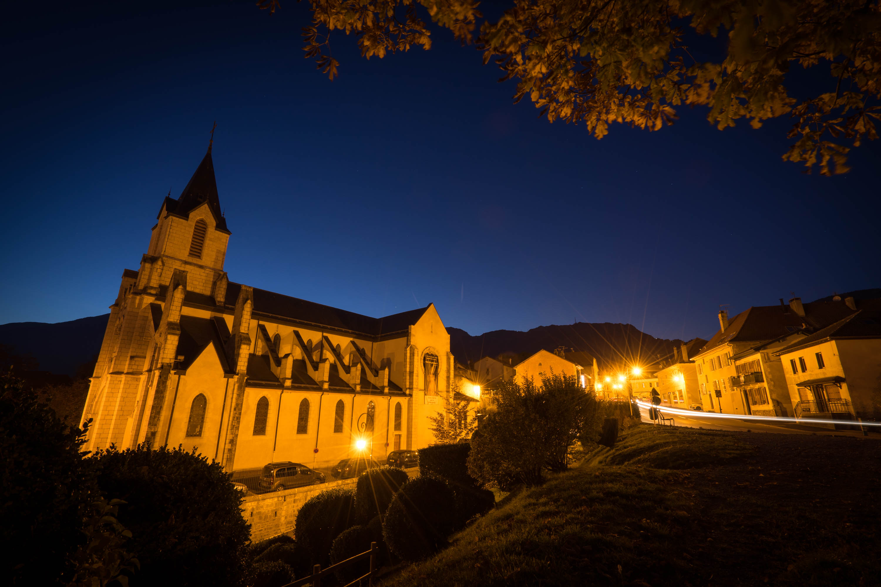 L'eglise de Gex by Night